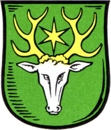 Herb miasta Welawa